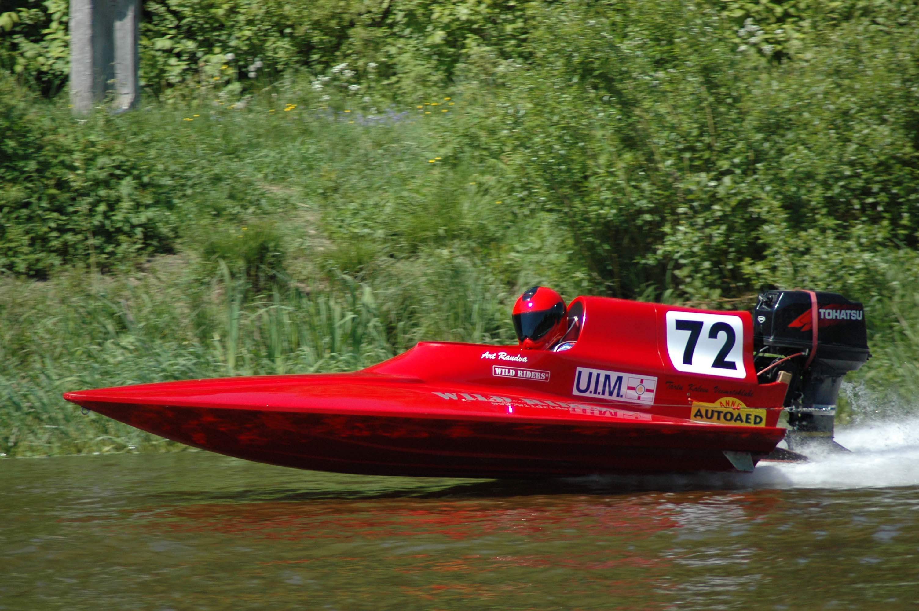 Maailmameister veemotos Art Raudva